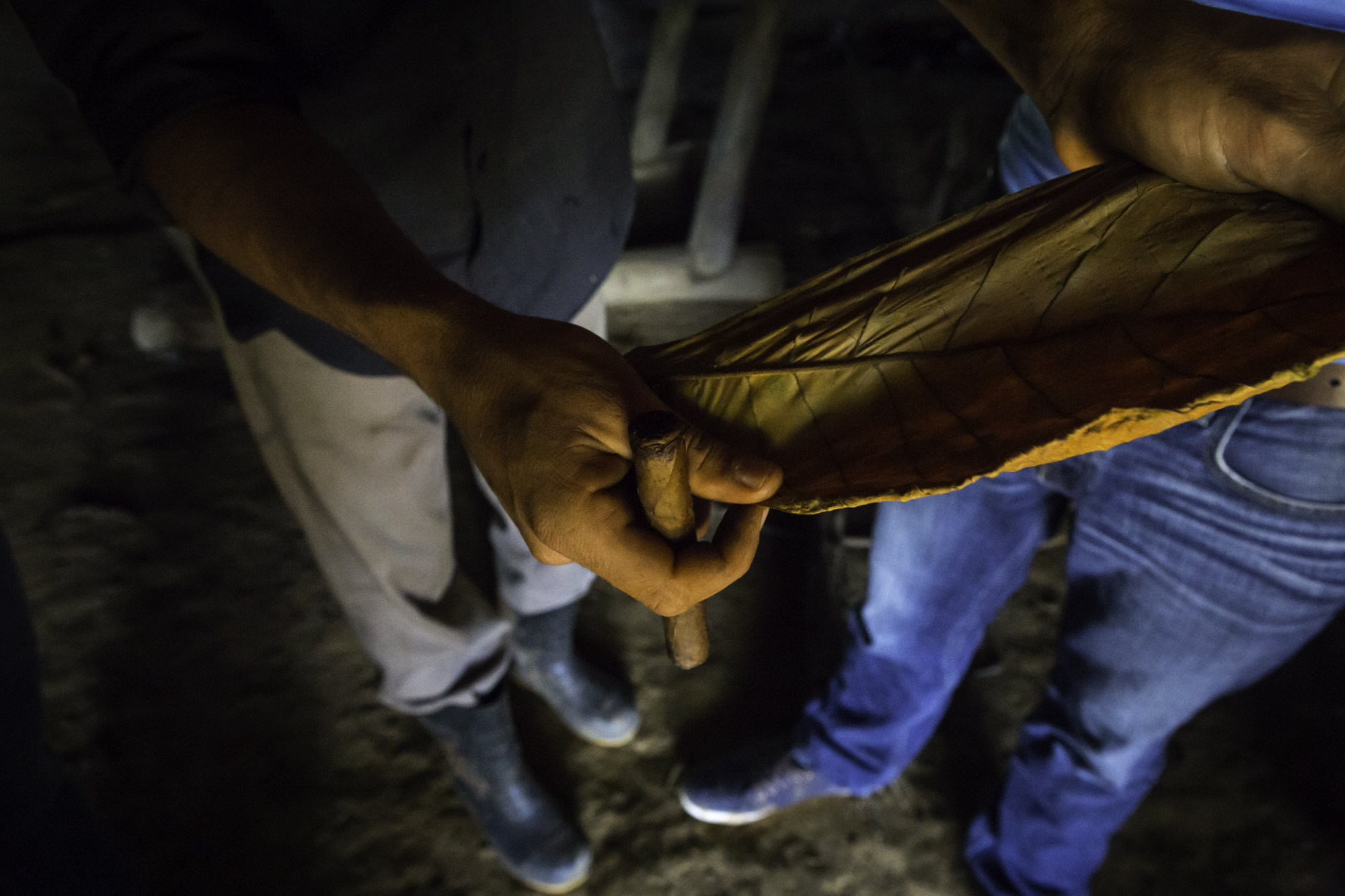 Foglia di tabacco per il sigaro Cohiba.